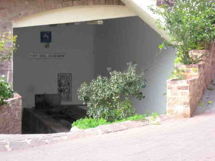 Fuente del lavadero en Segart